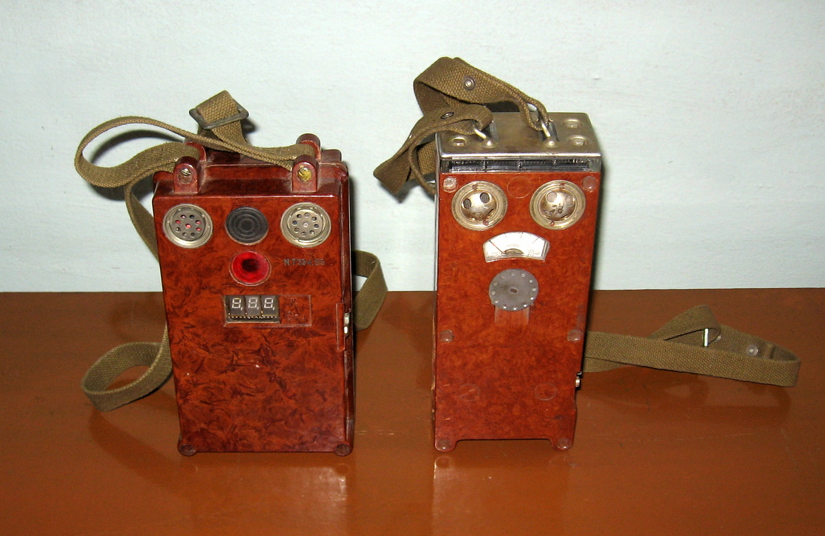 Signalling device of methane "Signal" (Ukraine) Сигналізатори метану "Сигнал" (Україна)